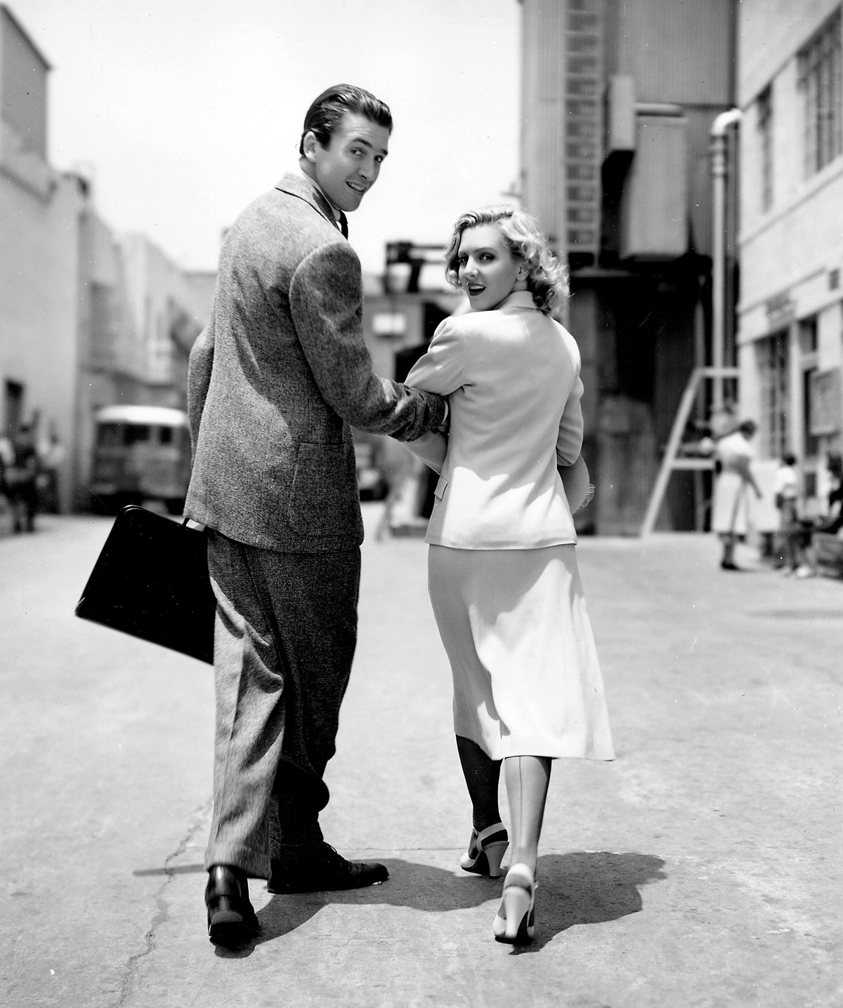 James Stewart en Jean Arthur op de set Mr. Smith Goes to Washington (1939). Arthur is wearing a costume designed by costume designer Robert Kalloch.